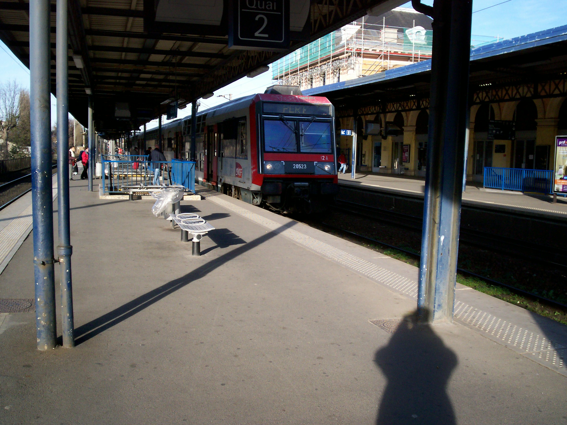 Rame Z 20500 en gare origine de Paris-Est